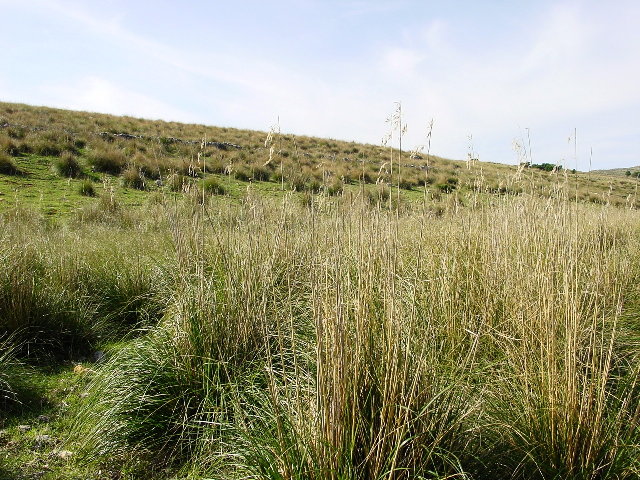 Riserva naturale dello Zingaro, Sicily Ampelodesmos mauritanicus